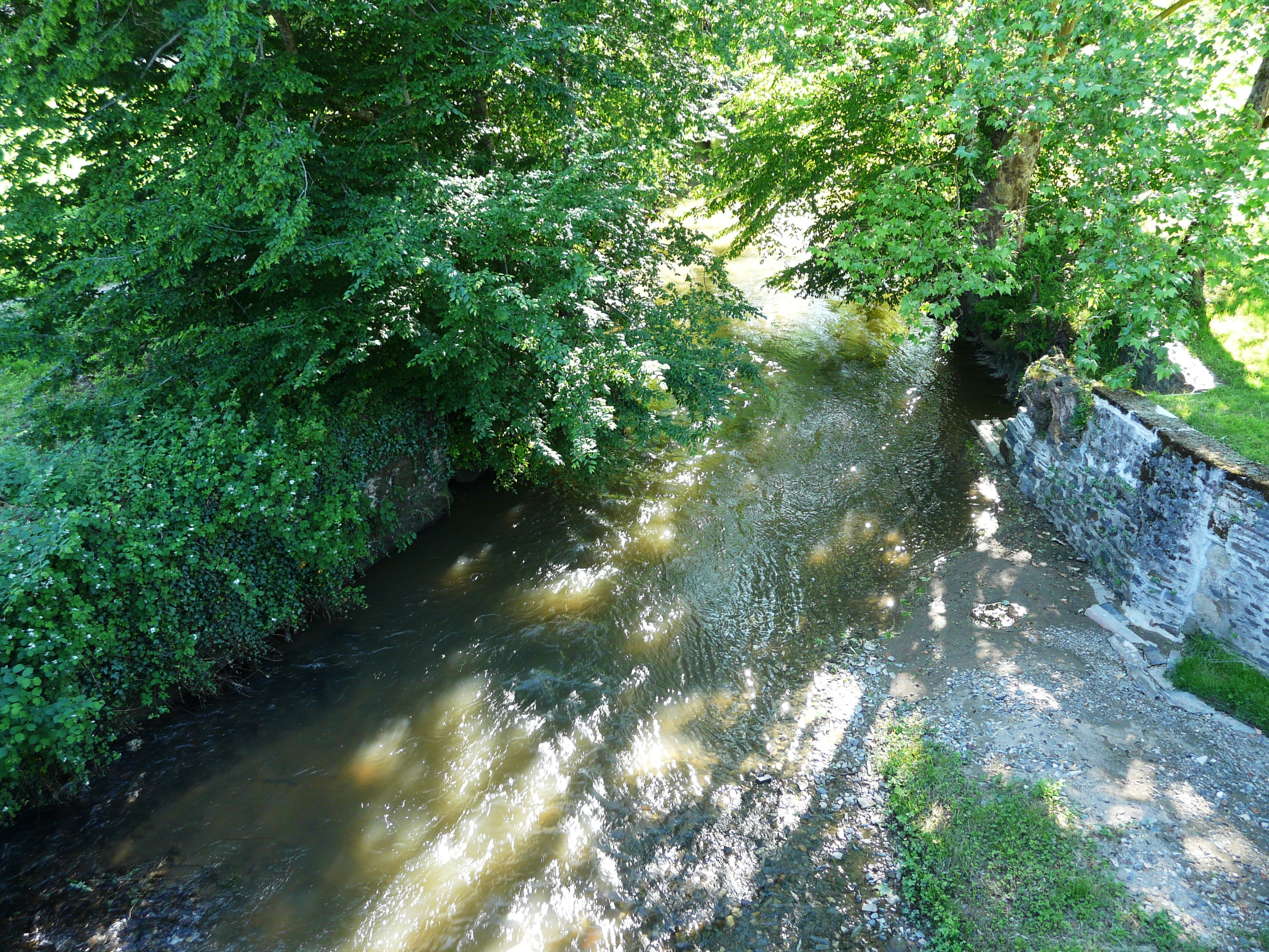 Le Maumont en aval du pont de l'Hôpital, Donzenac, Corrèze, France